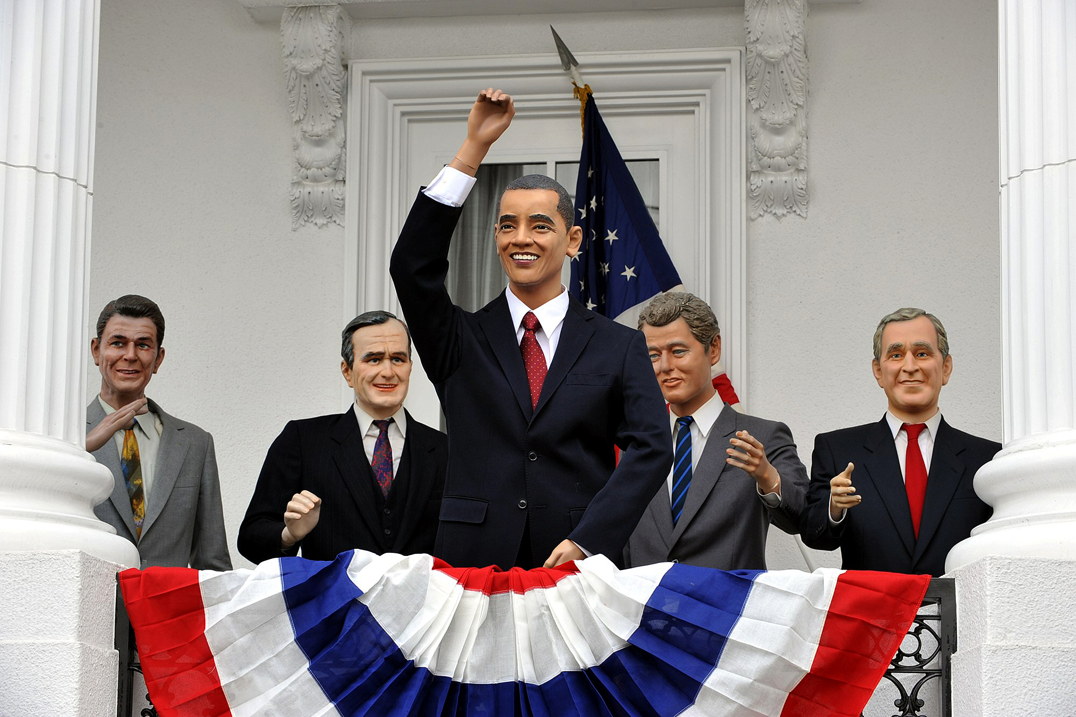 オバマ人形が東大阪のホワイトハウスで就任式を行った。